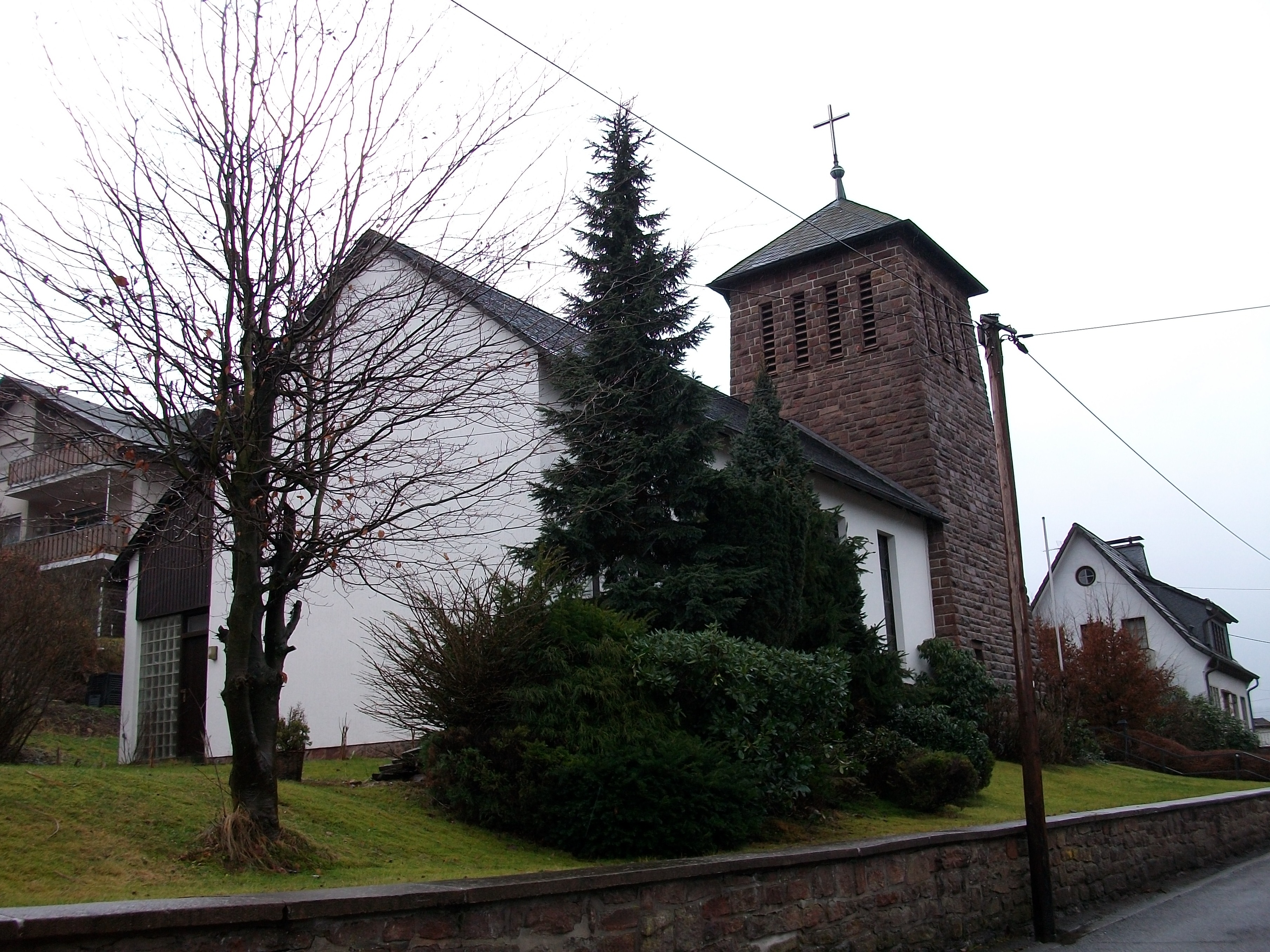 Emmauskirche in Kirchhundem-Würdinghausen, Germany